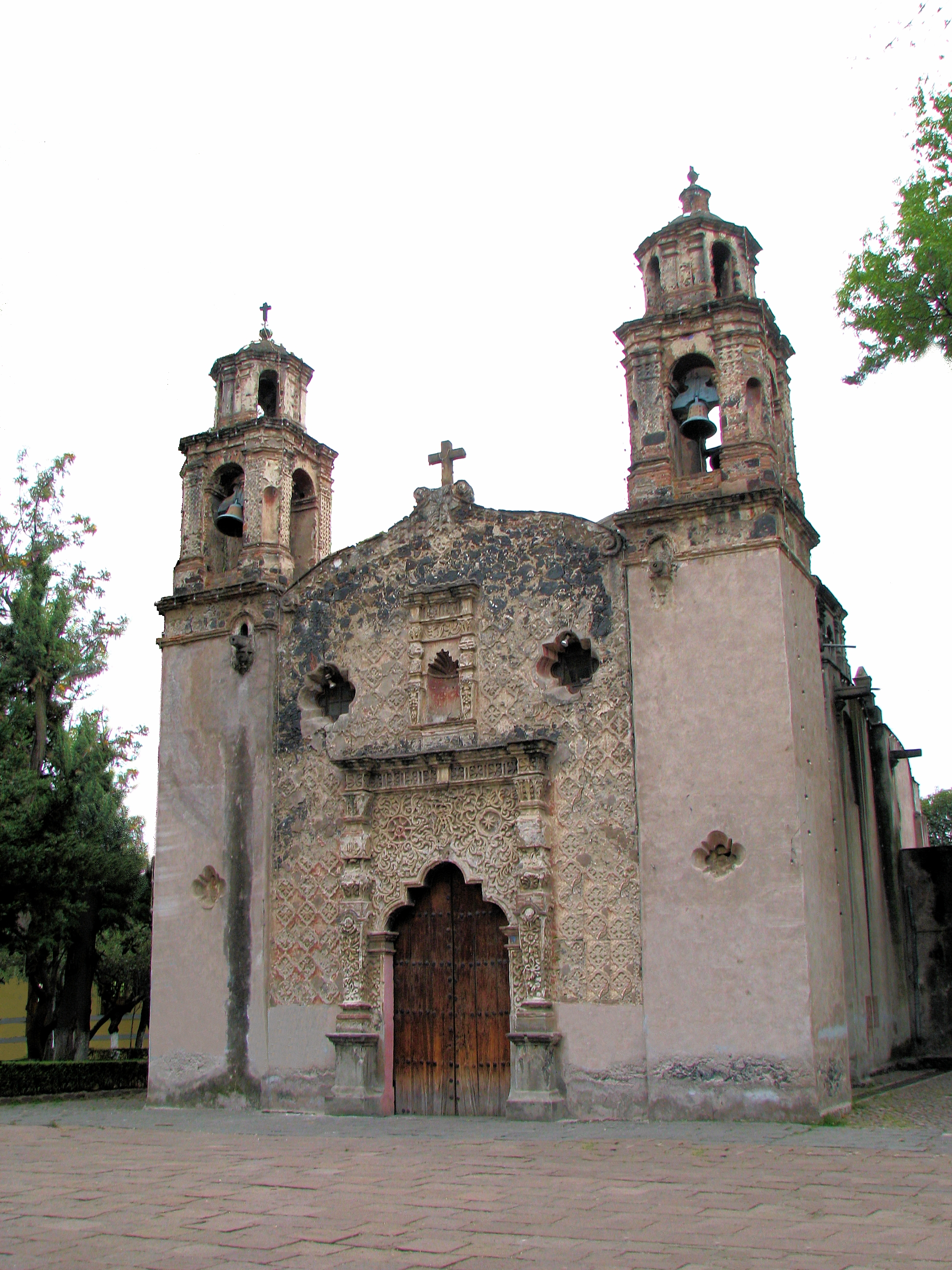 Fotografía, tomada en Enero del 2010, durante una fiesta familiar, (y a instancias de mi padre, quien es el que me inició en su hobbie) se editó para destacar la iglesia, eliminando una orilla de una banca y un pequeño arbolito, principalmente.